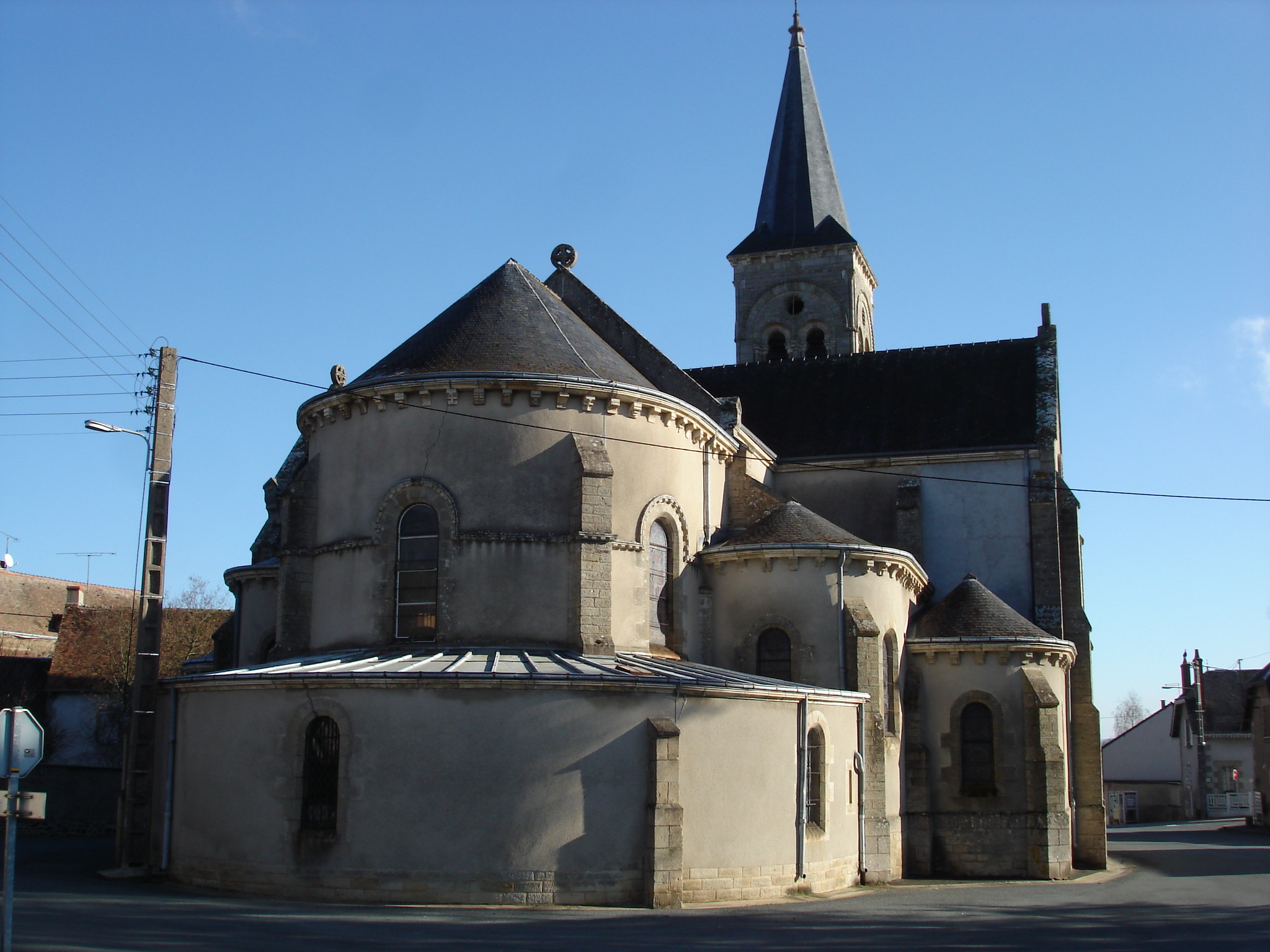 Sainte-Sévère-sur-Indre (36) : L'église Sainte-Sévère.